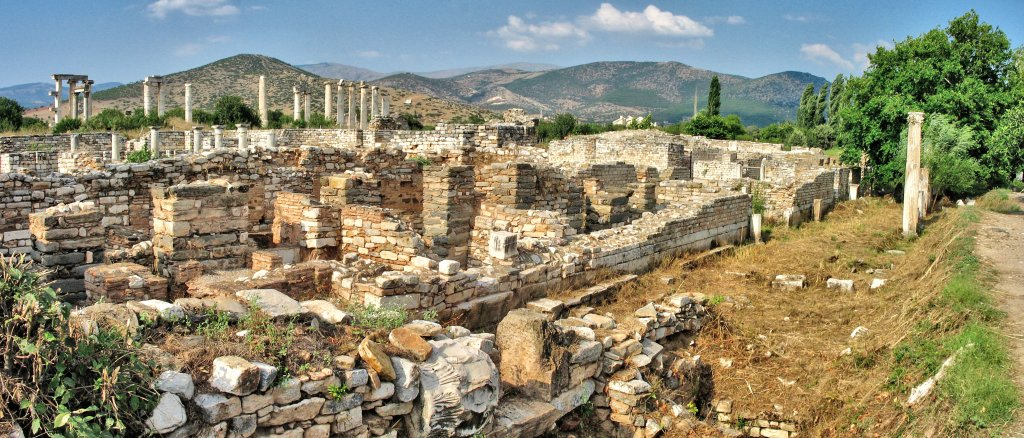 Afrodisias Artemis ve Bausterion Panorama